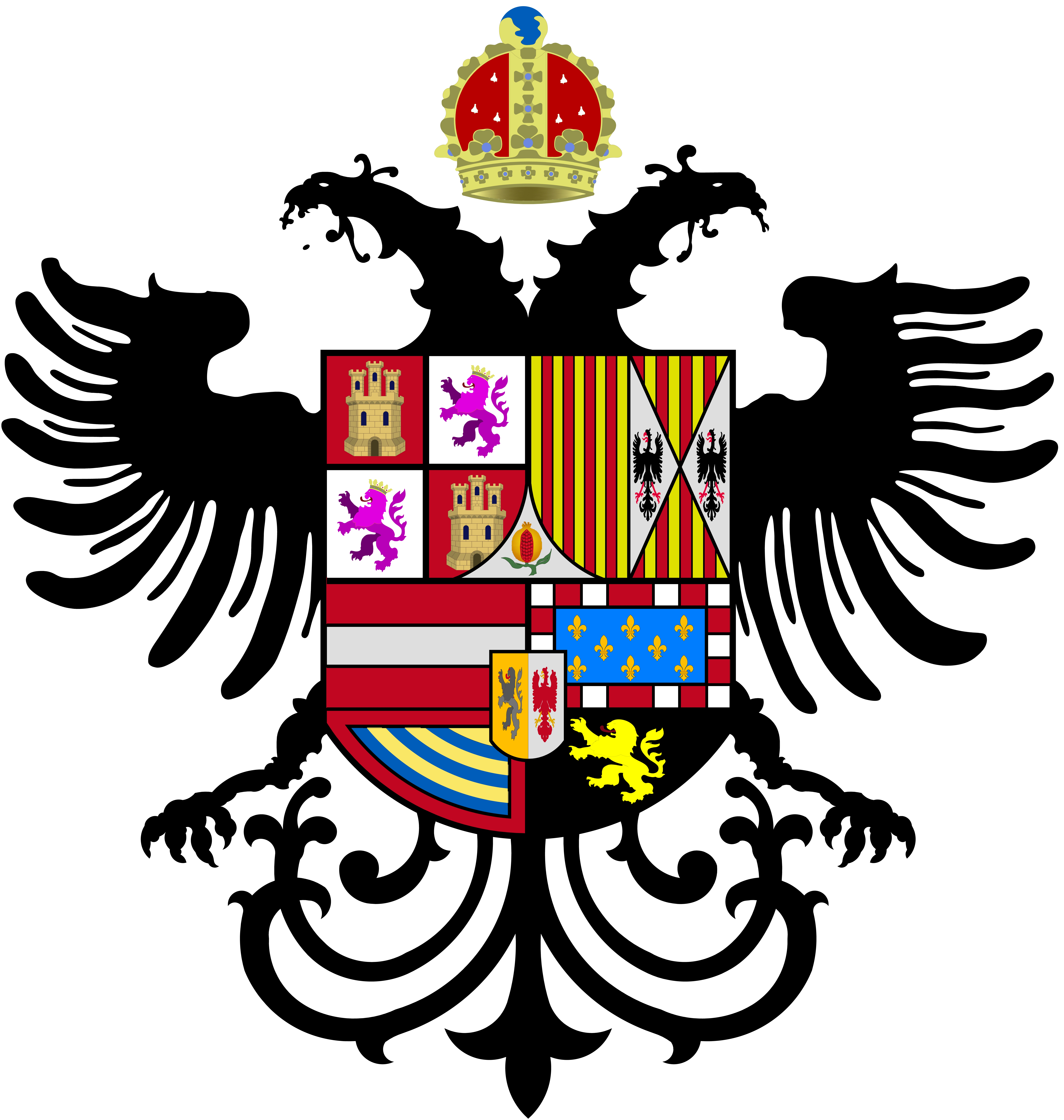 Escudo Oficial de Villanueva de Córdoba